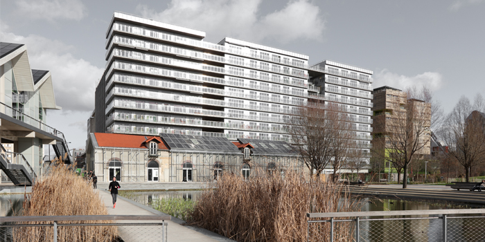 Opération de logement sur la ZAC Cardinet-Chalabre à Paris